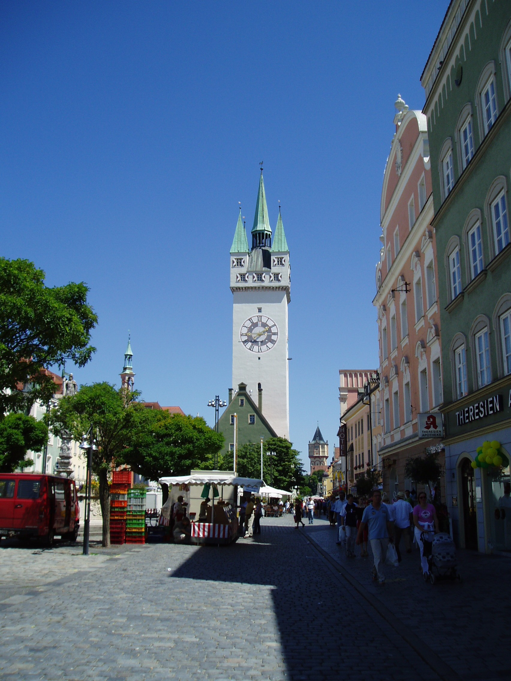 Stadtturm, vom Theresienplatz aus gesehen, in Straubing, Bavaria, Germany